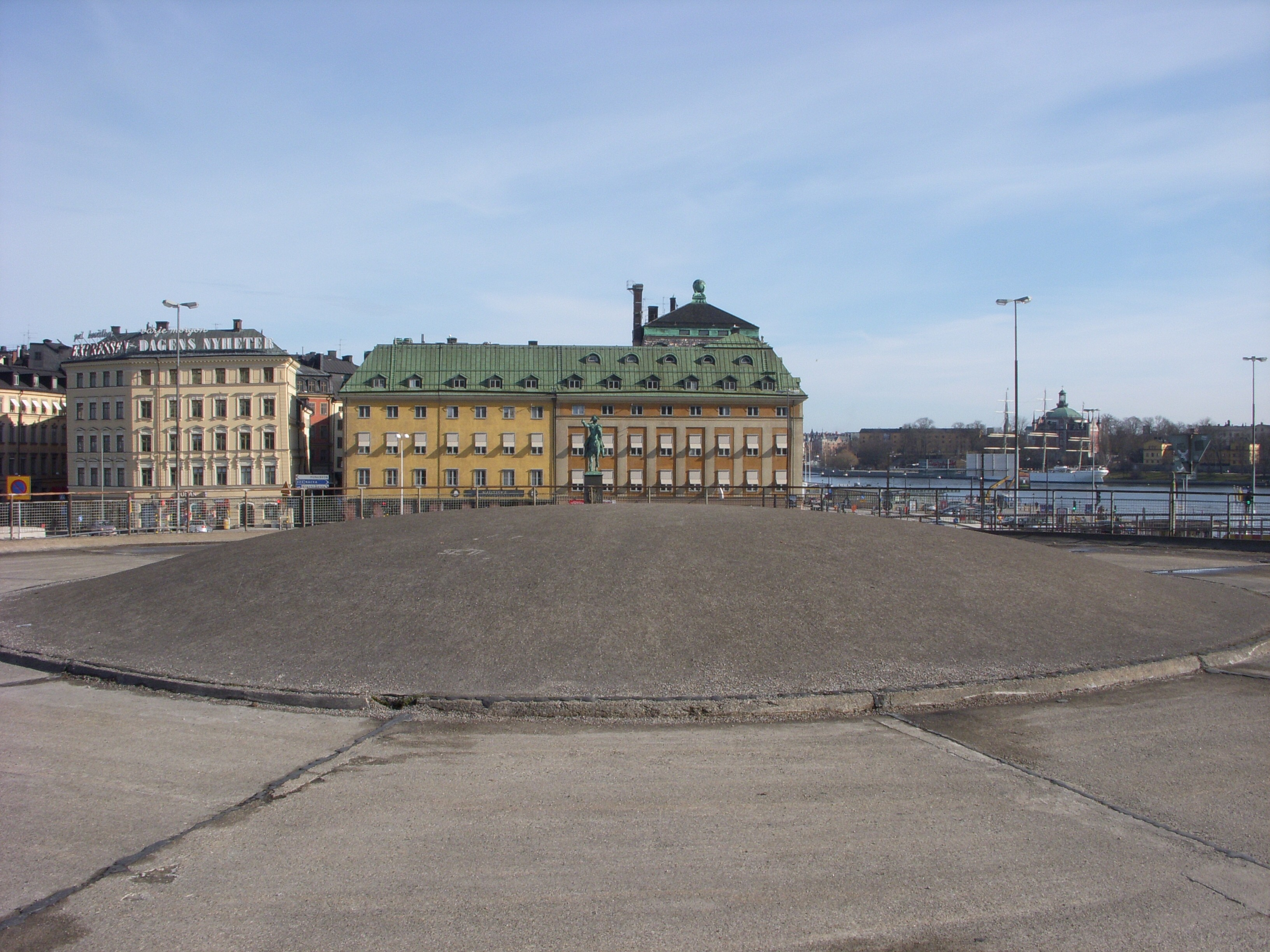 Slussen i Stockholm, Blå bodarnas kupol från utsidan